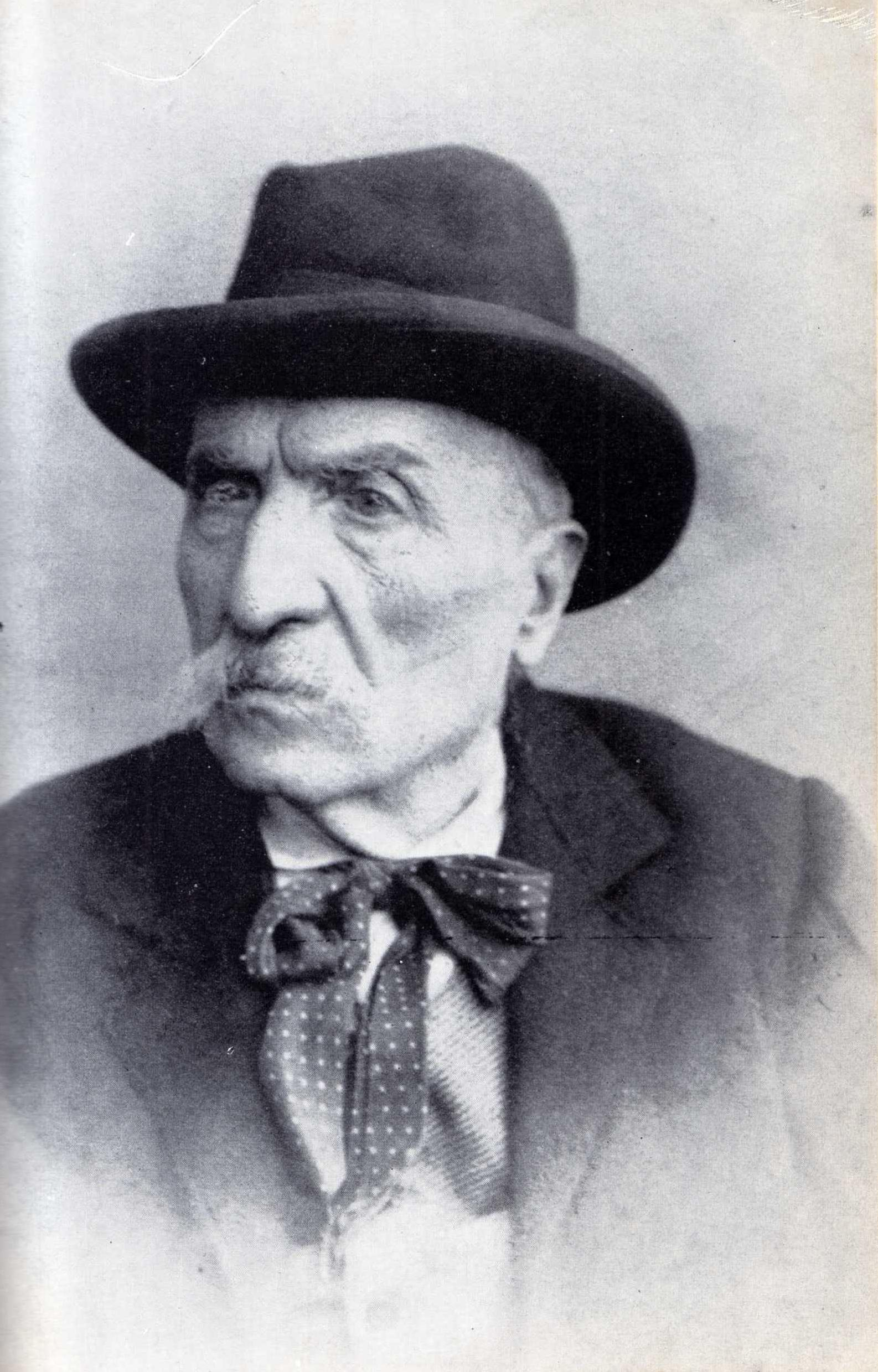 Foto di un ex sindaco di Bisenti deceduto nel 1903